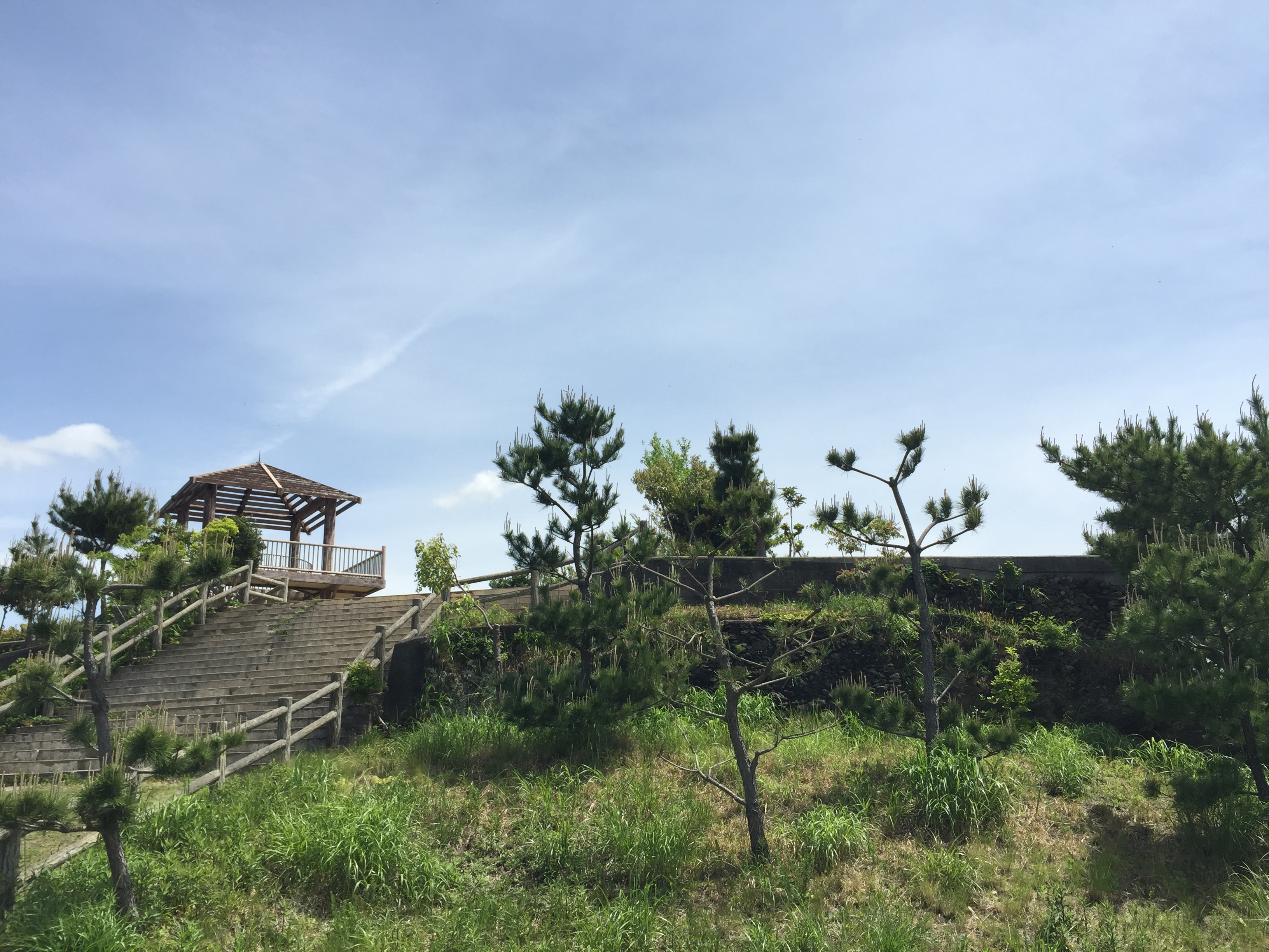 新和歌浦ロープウェイの高津子山駅跡。2016年4月23日撮影。The site of Takozushiyama Station, Shin-Wakaura Ropeway. Photo shooting date:2016.4.23